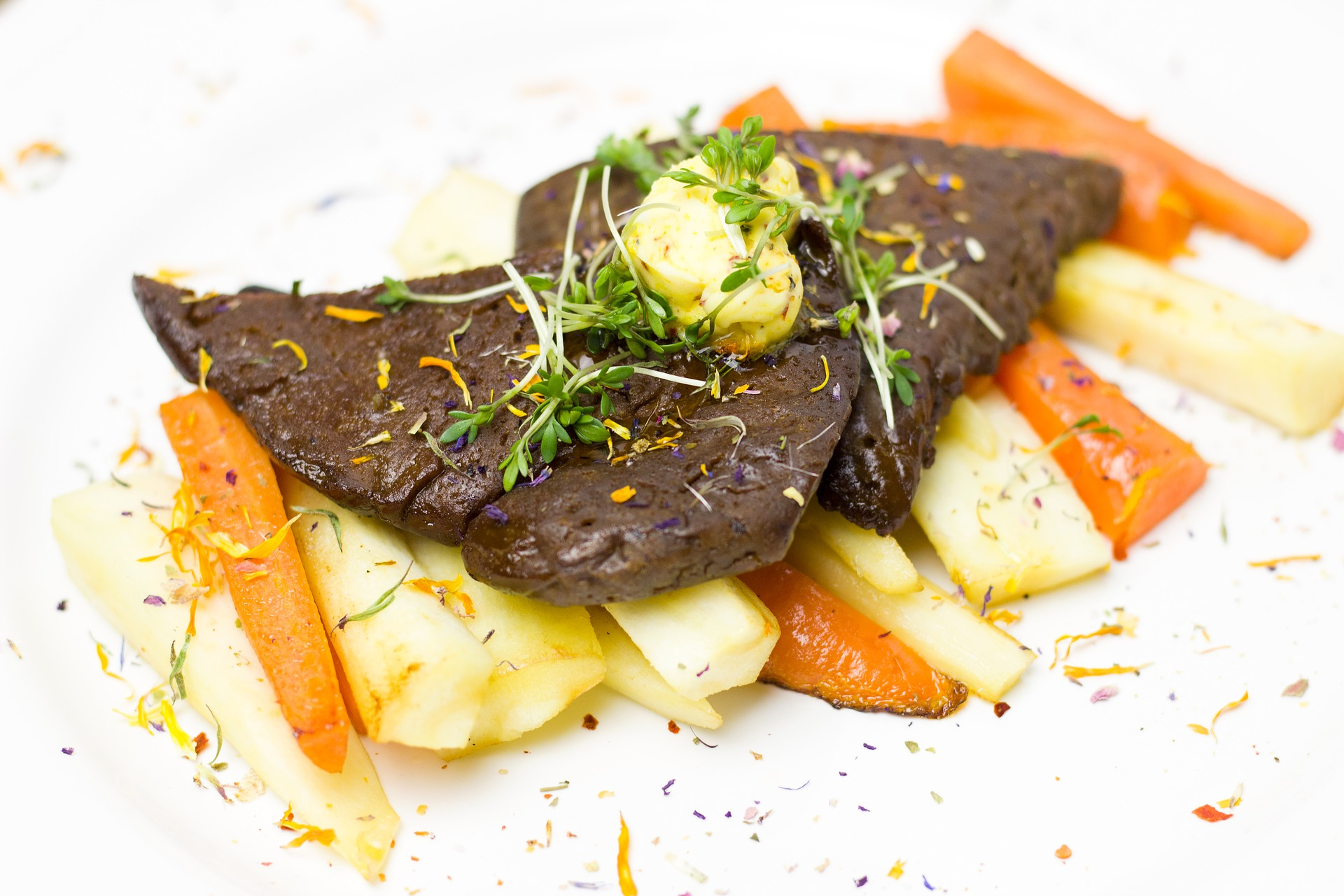 Seitan et légumes racines